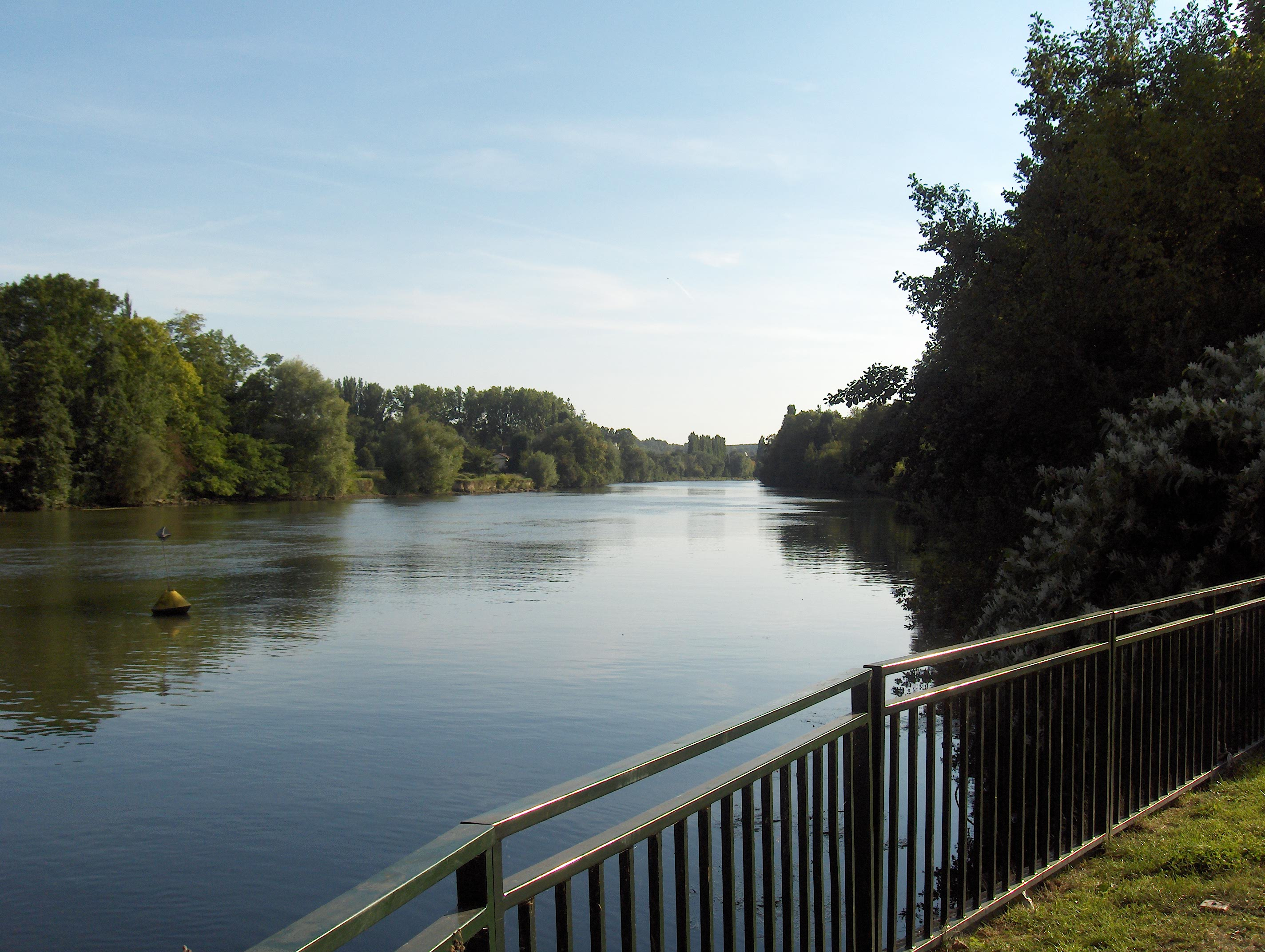 Vue de l'Oise depuis les berges de Butry-sur-Oise(Val-d'Oise)